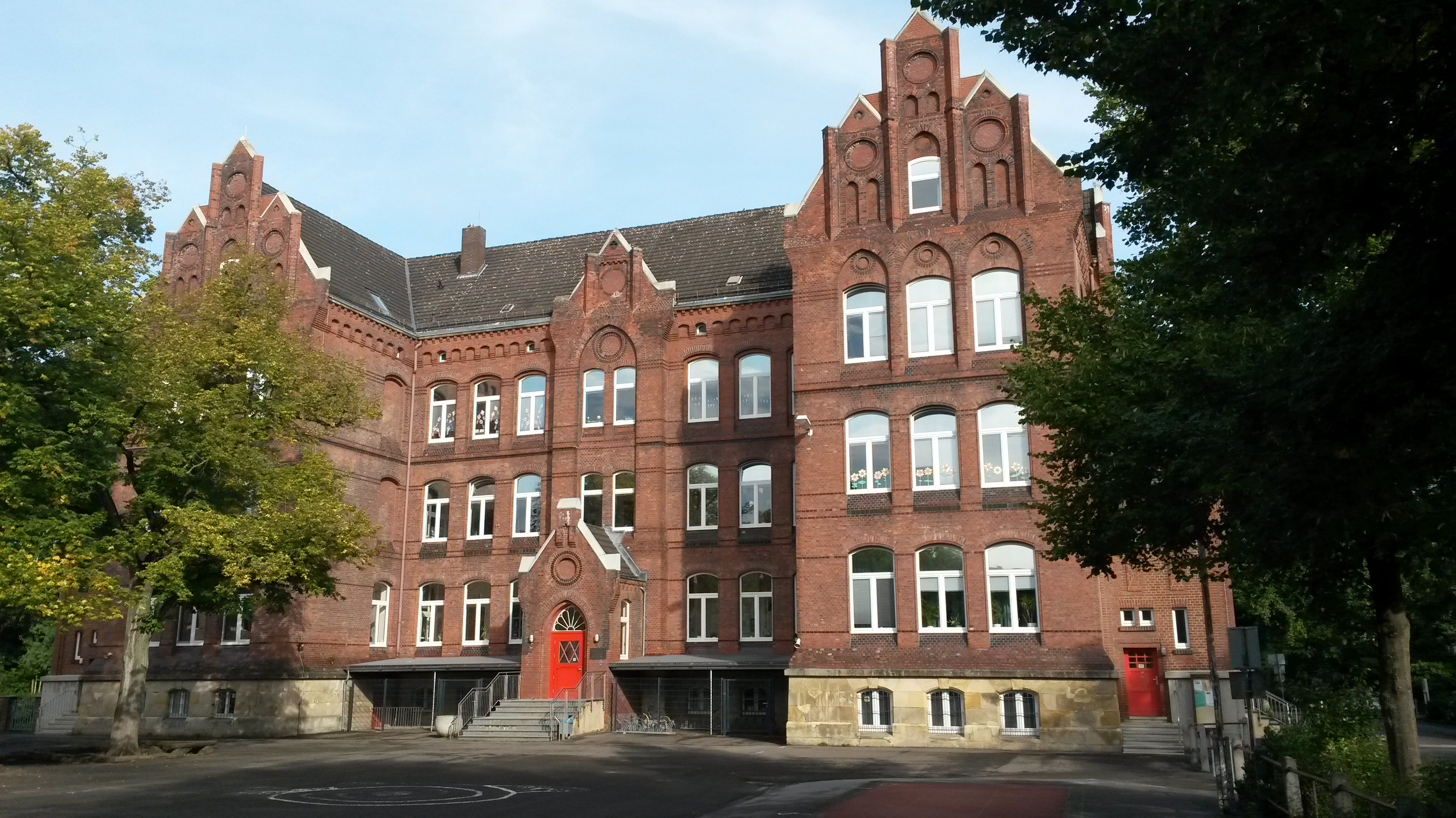 Ansicht vom Schulhof